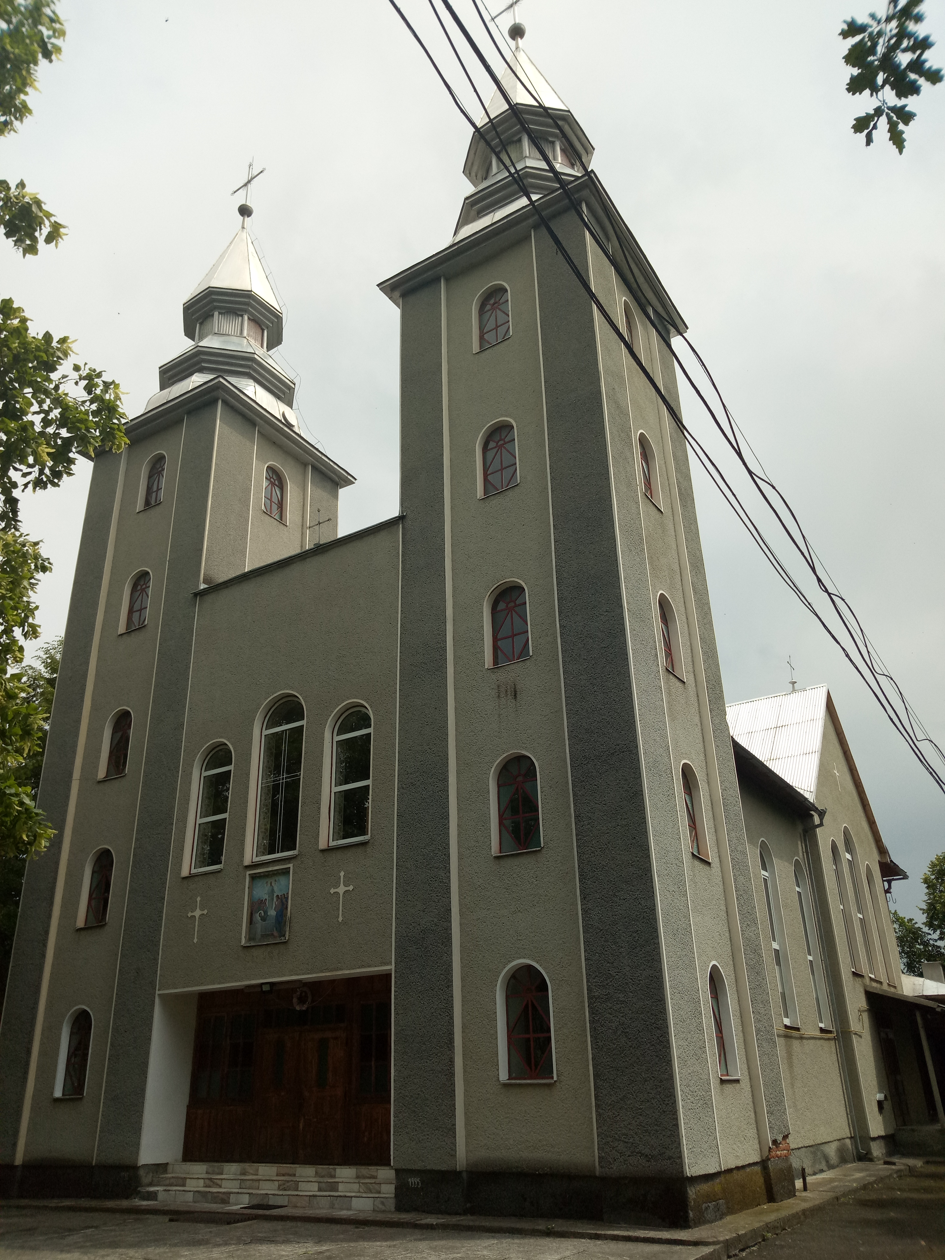 фотографія